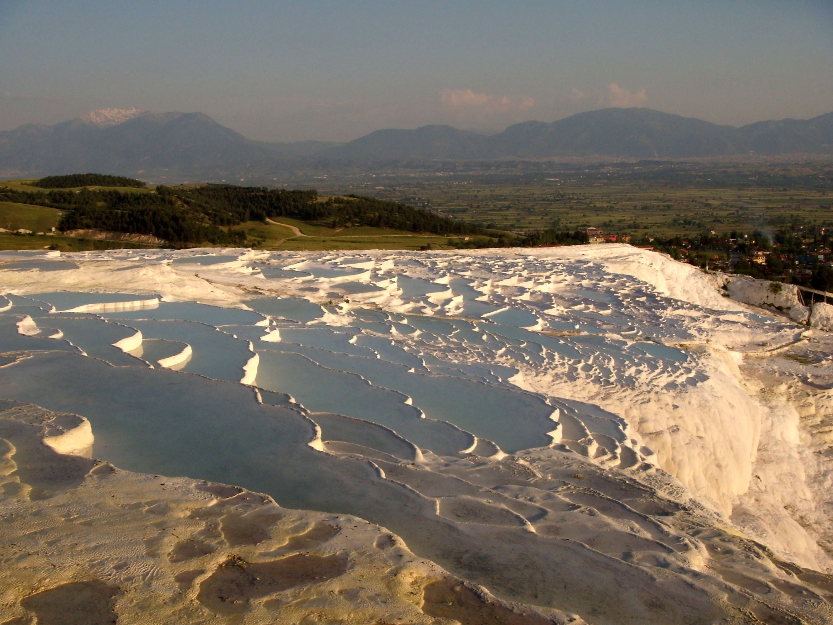 Pamukkale cap el tard